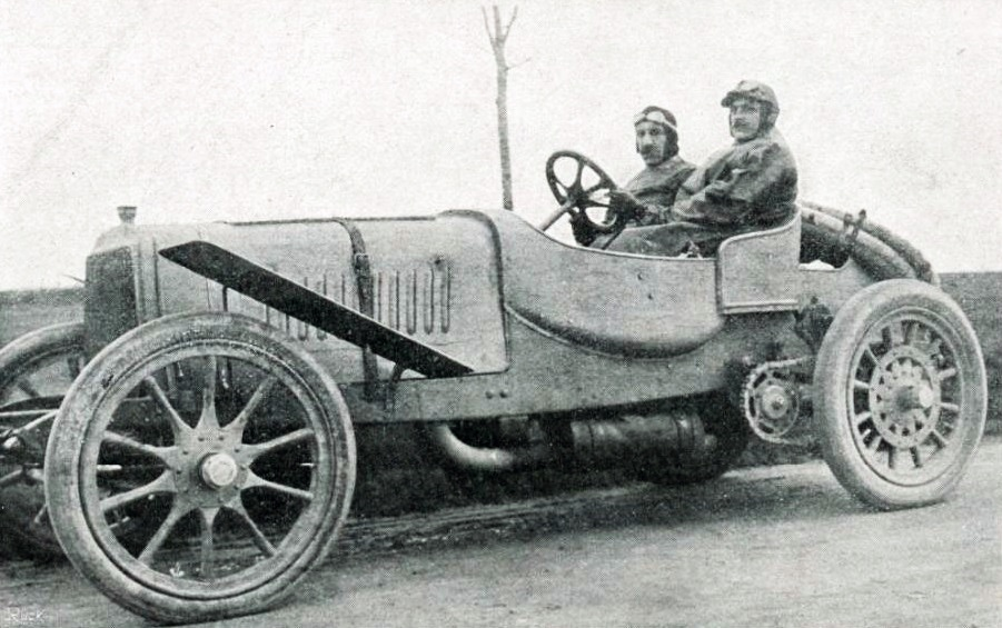 Henri Cissac sur sa Panhard & Levassor Grand Prix en 1908 - La Vie au Grand Air, 16 mai 1908, p.318